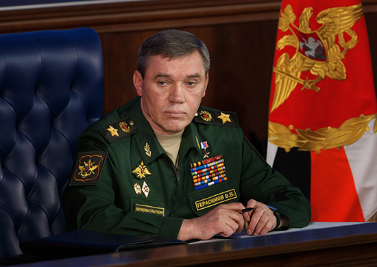 Врио Министра обороны России генерал армии Валерий Герасимов поздравил военнослужащих и ветеранов с Днем Сухопутных войск